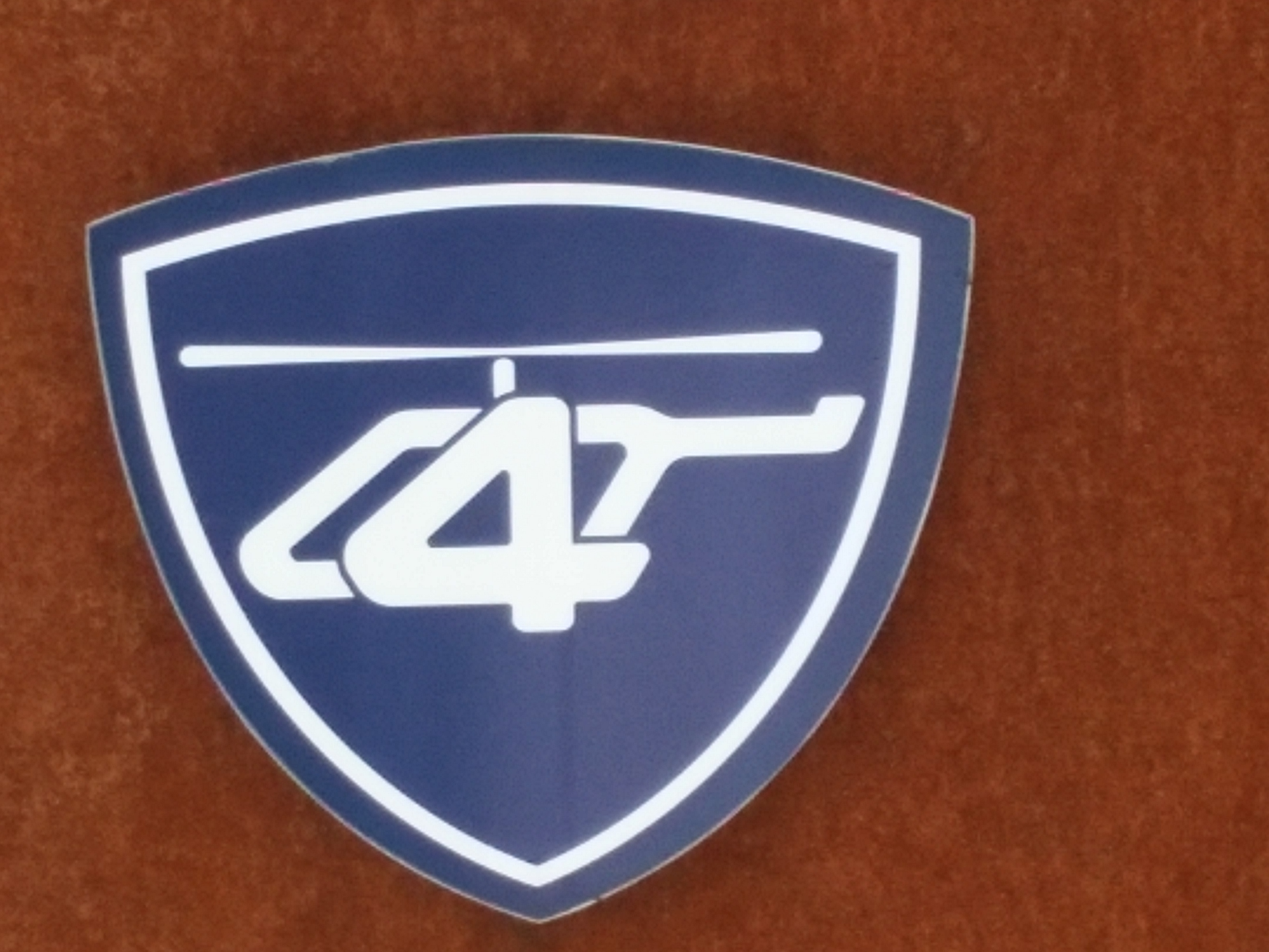 Emblem LT4 It is a partial photo of an public monument